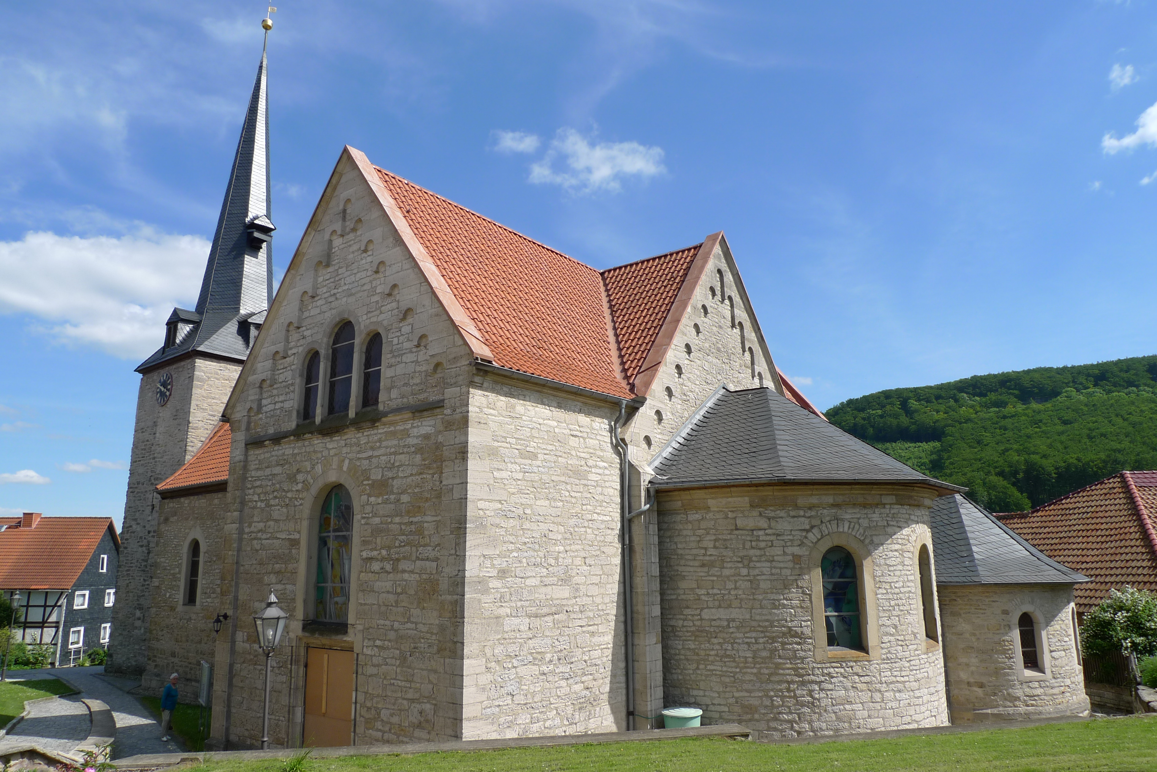 Katholische Kirche St. Johannes der Täufer in Holungen (Eichsfeld), Nordwestansicht